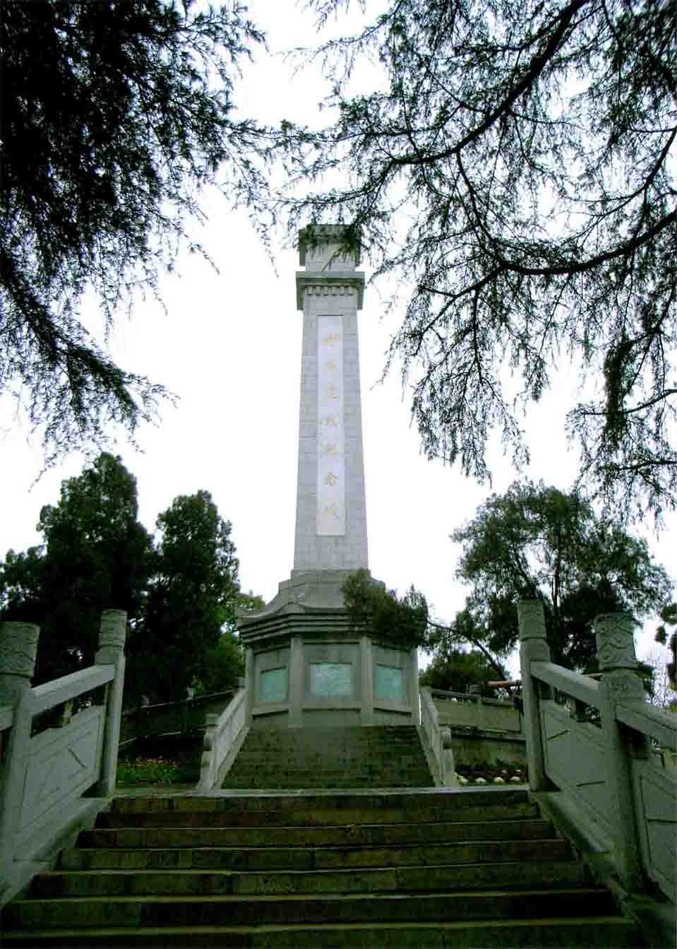 位于岳屏山